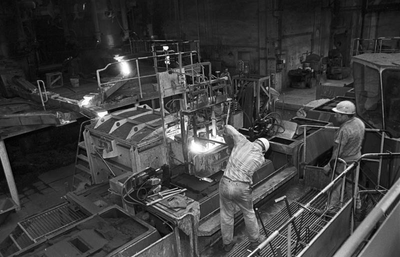 Lauchhammer, Schwermaschinenbau ADN-ZB/Weisflog 4.9.89 Bez. Cottbus: Wettbewerb Alle 66 Sekunden wird in dieser mikorelektronisch gesteuerten Fertigungslinie im Schwermaschinenbau Lauchhammerwerk eine Badewanne gegossen. Um das Wohnungsbauprogramm der DDR zu unterstützen, haben sich die Kollektive des Betriebes vorgenommen, im kommenden Jahr erstmals eine Stückzahl von 215.000 Gußbadewannen zu erreichen. Die nötigen Voraussetzungen dafür schufen die Lauchhammerwerker mit einer viermonatigen Rekonstruktion der Formerei und der Modernisierung weiterer Anlagen. Der Betrieb ist ain der DDR Alleinhersteller von Badewannen für neugebaute und modernisierte Wohnungen.